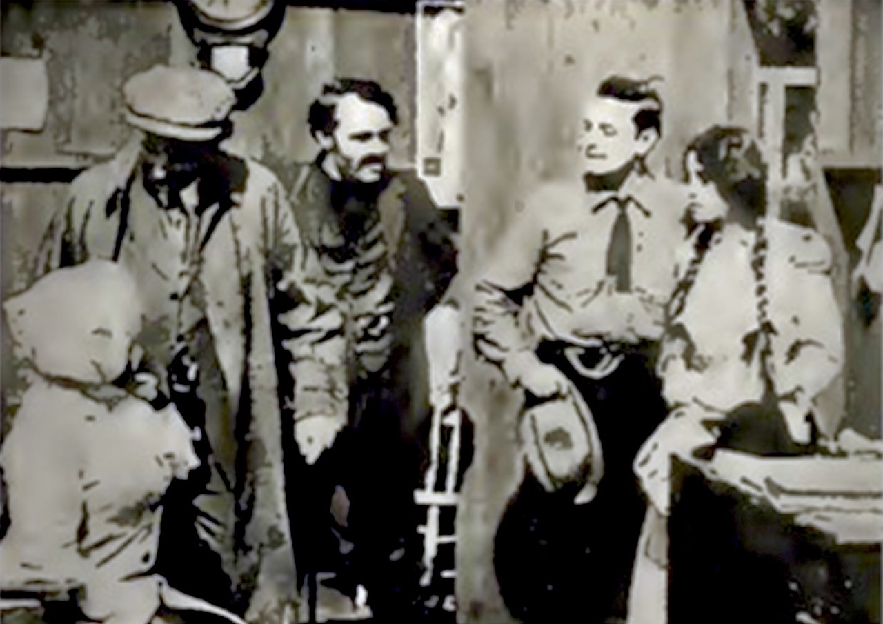 Photo film